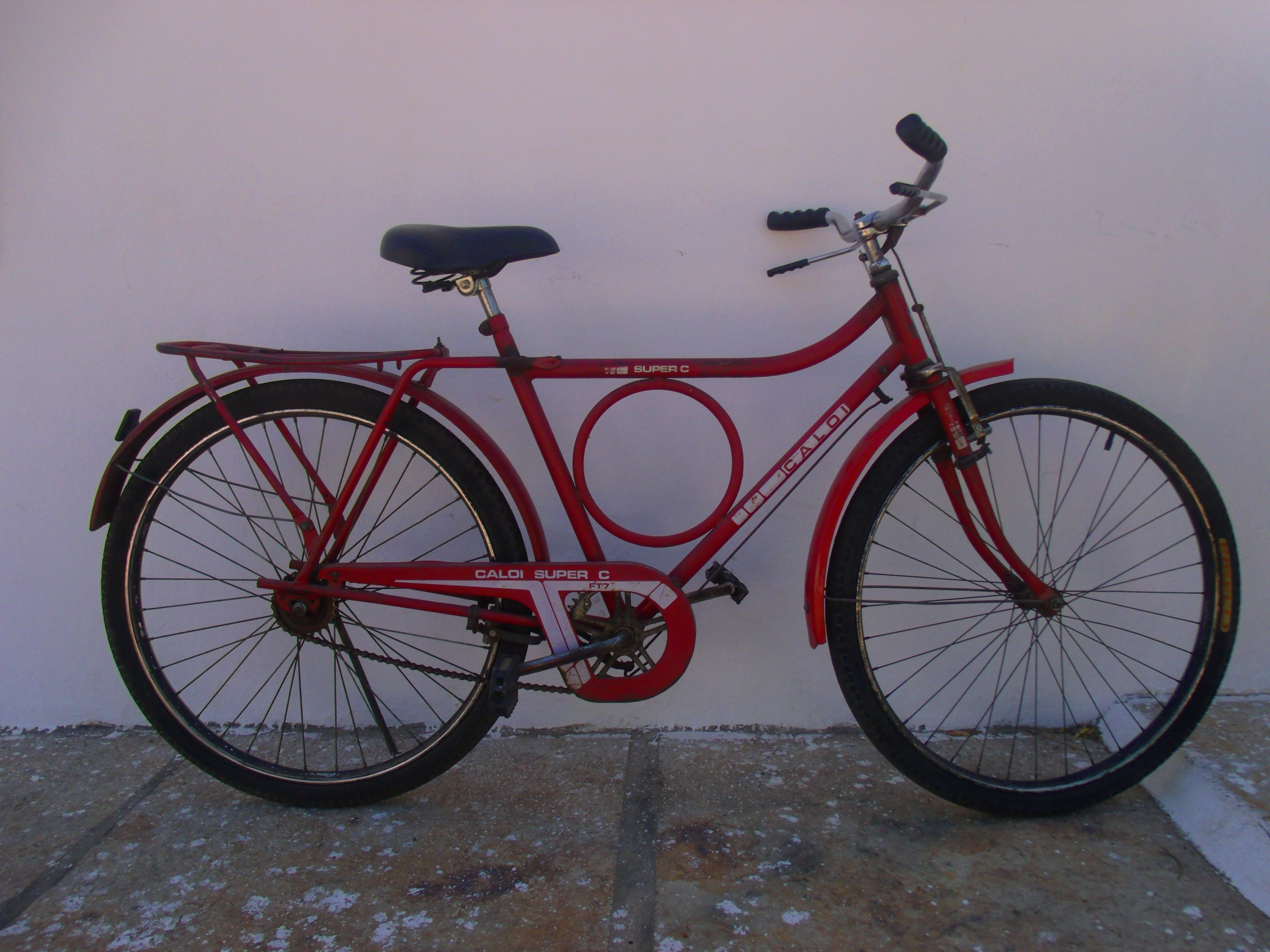 Caloi super C ft 7. de 198?.